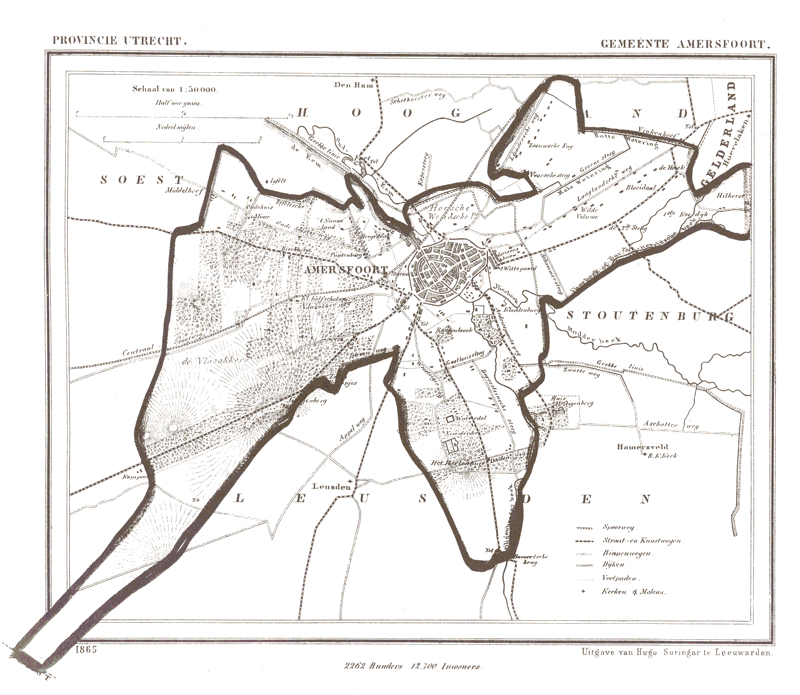 De naam van de website waar het vandaan kwam moet worden vermeld. De afbeelding komt van . Het is de kaart van de gemeente Amersfoort uit 1865. The name of the website it came from must be used. This image came from: . It is the map of gemeente Amersfoort.